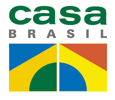 Logo do Projeto Casa Brasil